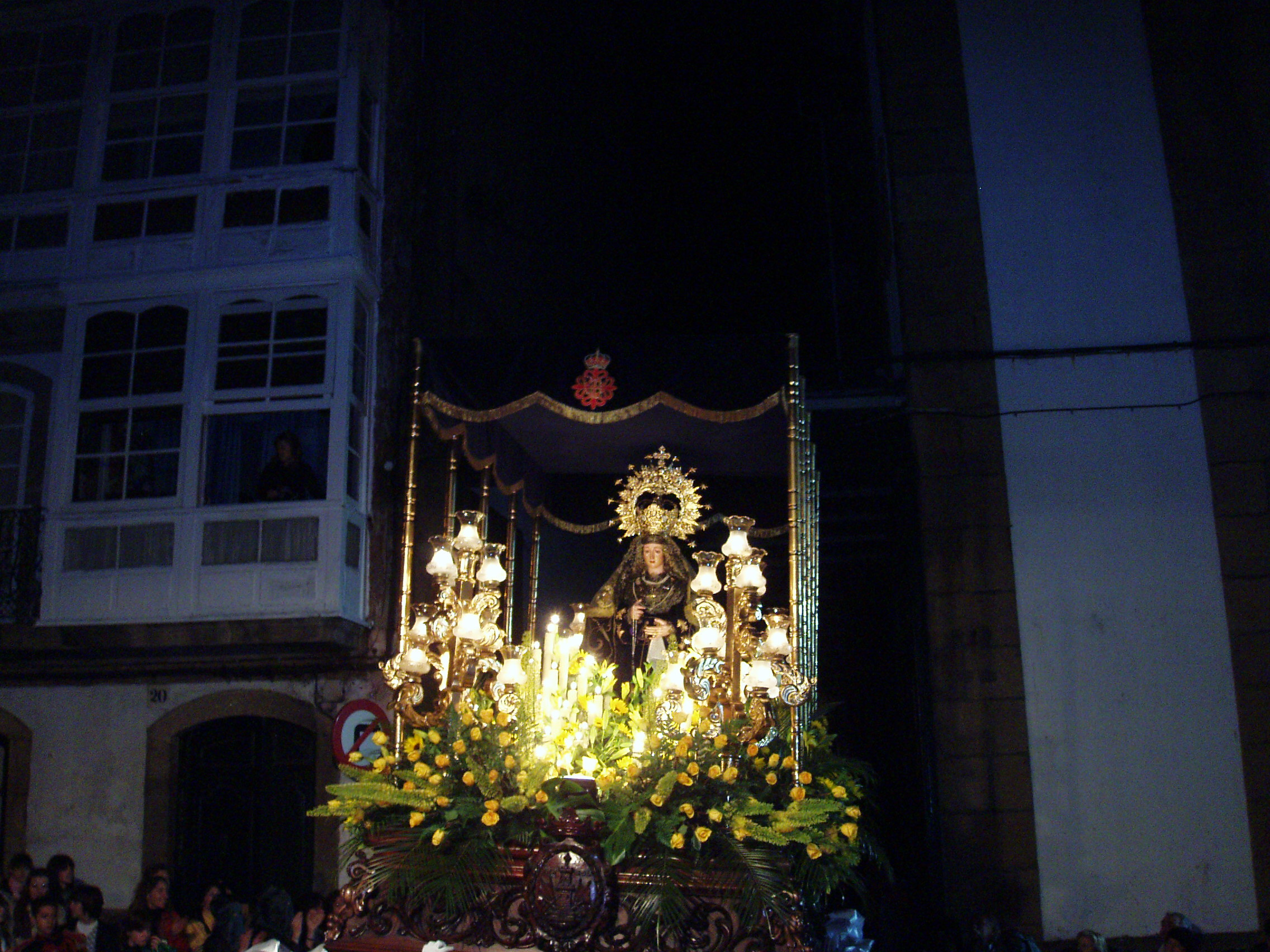 Paso de la Virgen de la Amargura en la procesión de Lunes Santo de 2.008